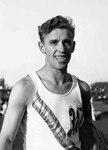 Zeno Dragomir in Bucharest